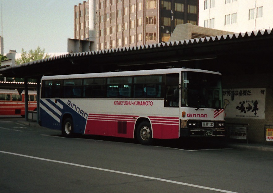 当初は両社共通カラー専用車を使用